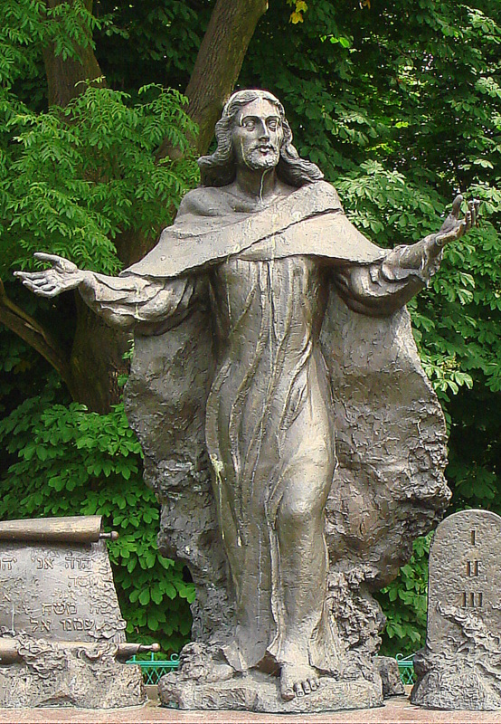 Częstochowa, zespół klasztorny paulinów na Jasnej Górze